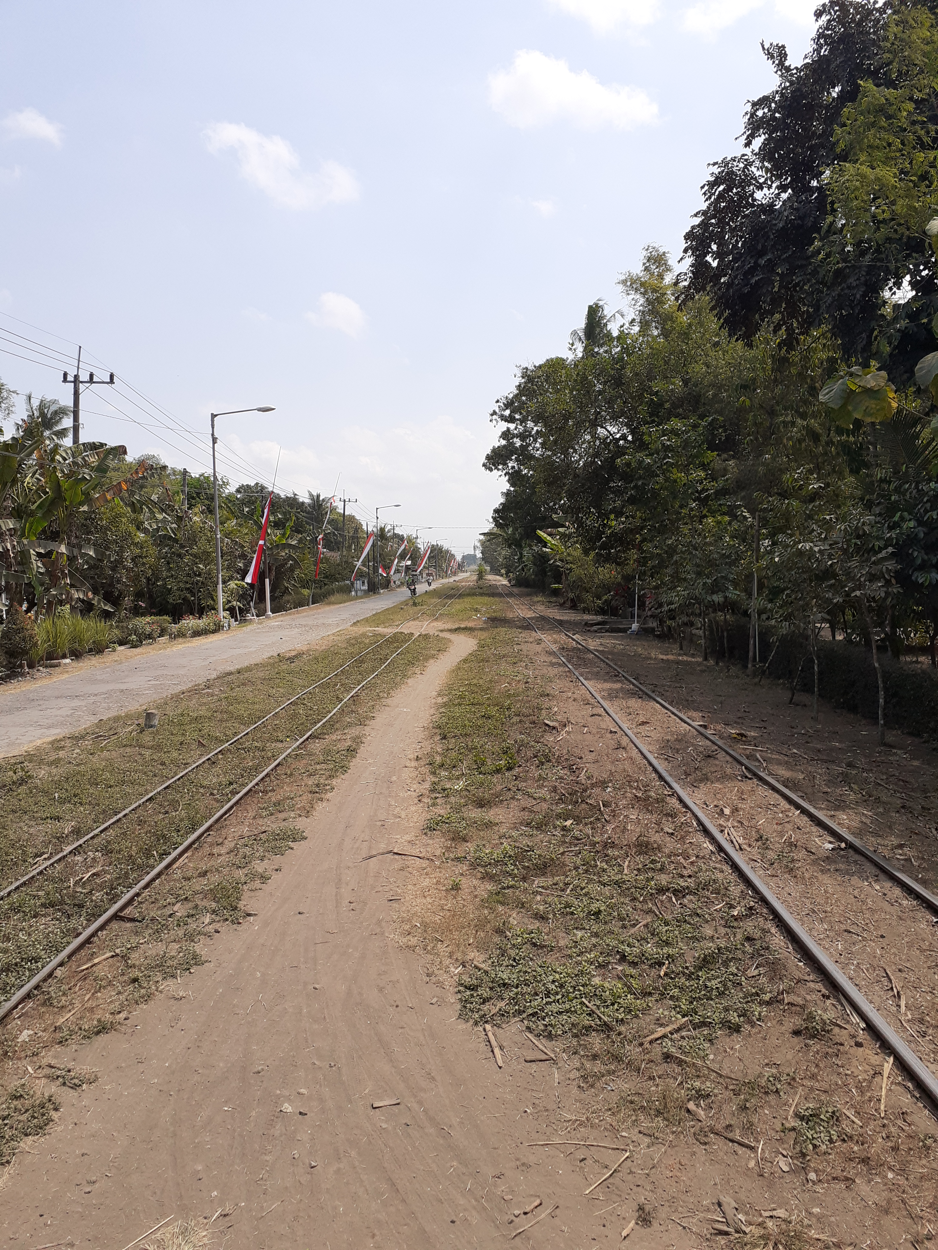 Jalur rel ganda bersepur sempit di Desa Rejoagung, Kec. Semboro, Kab. Jember